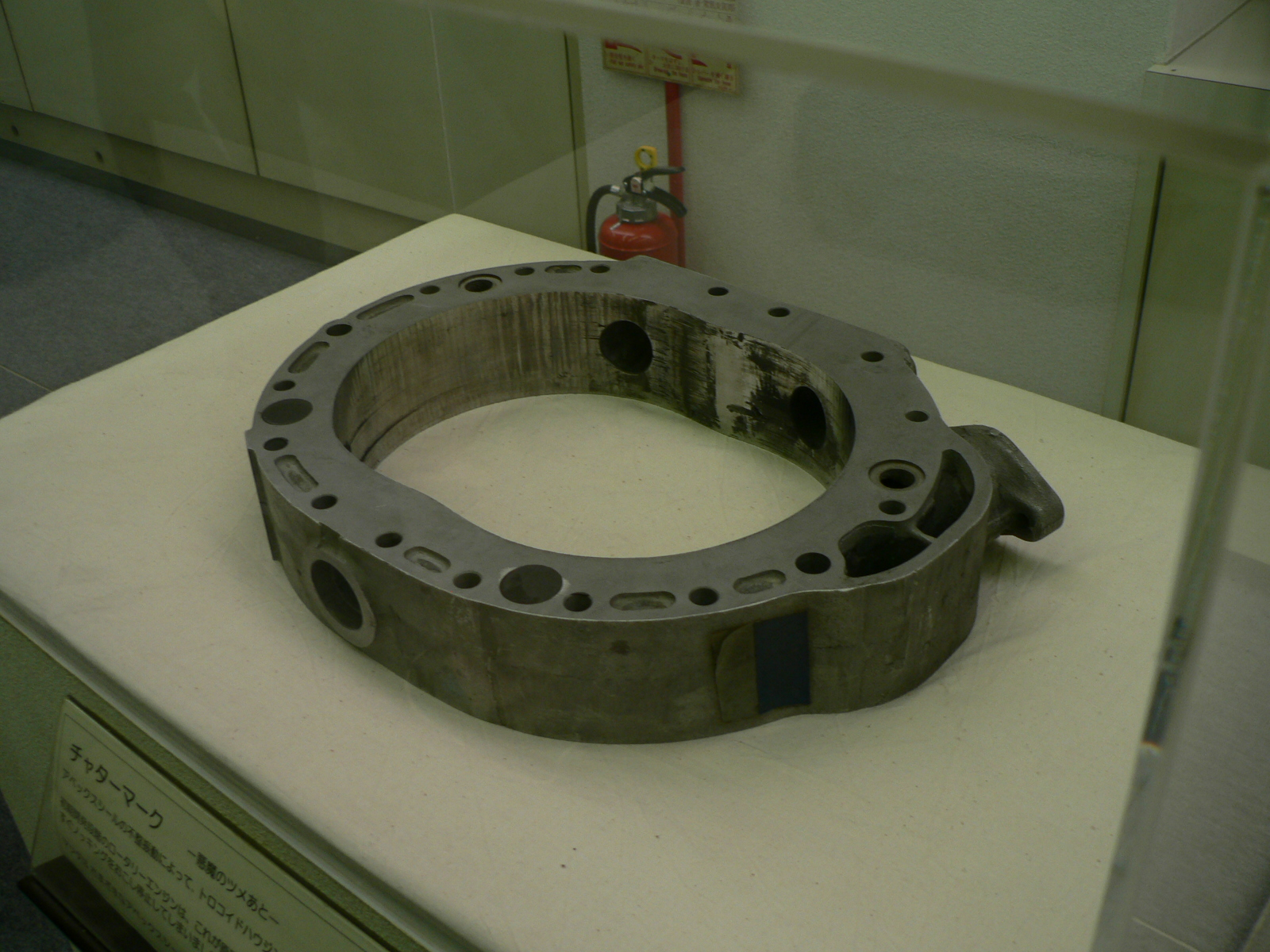 「悪魔のツメあと」と言われた「チャターマーク」が残ったハウジング。 マツダR&Dセンター横浜で撮影。